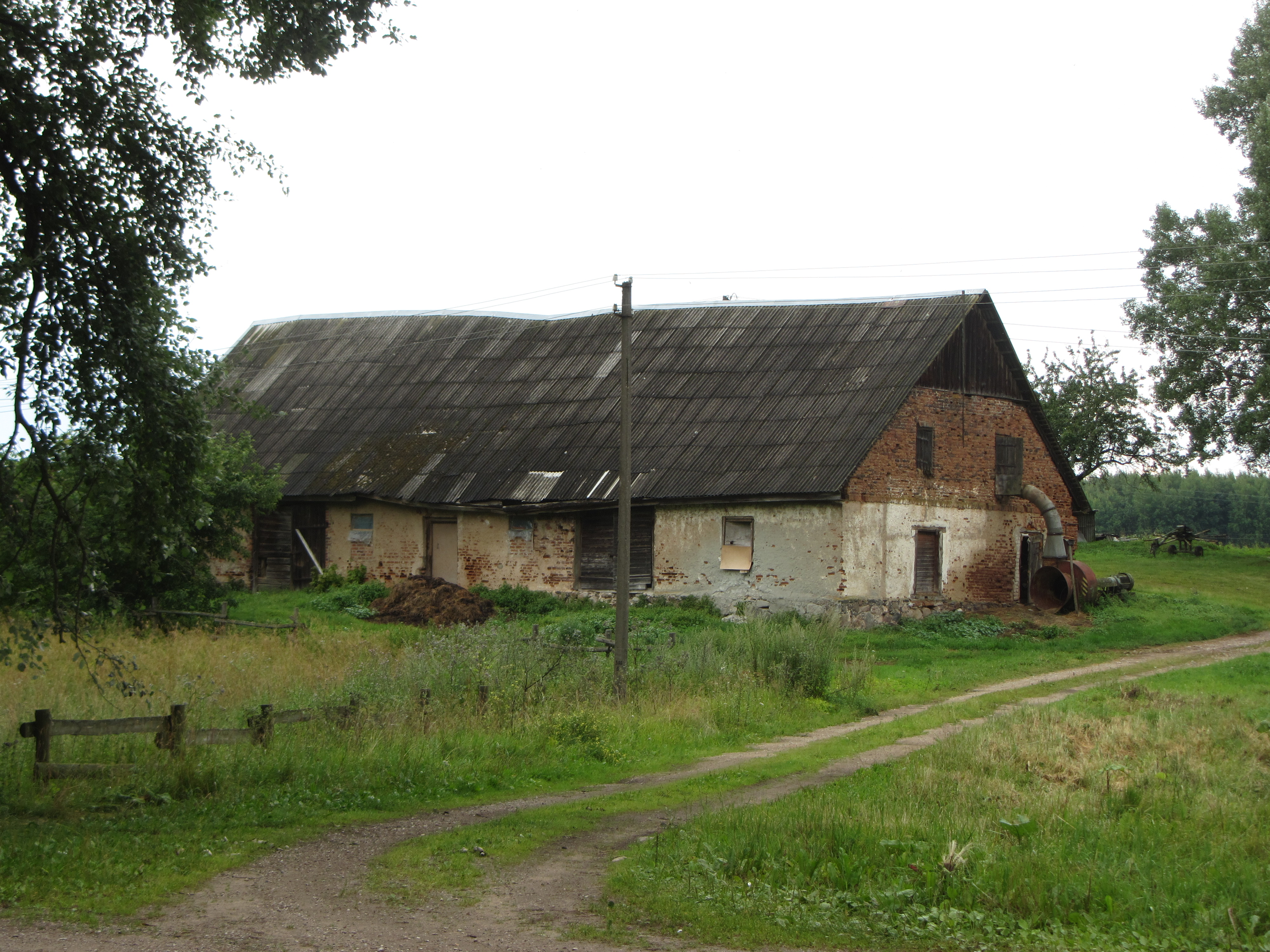 Jotaučiai 28425, Lithuania